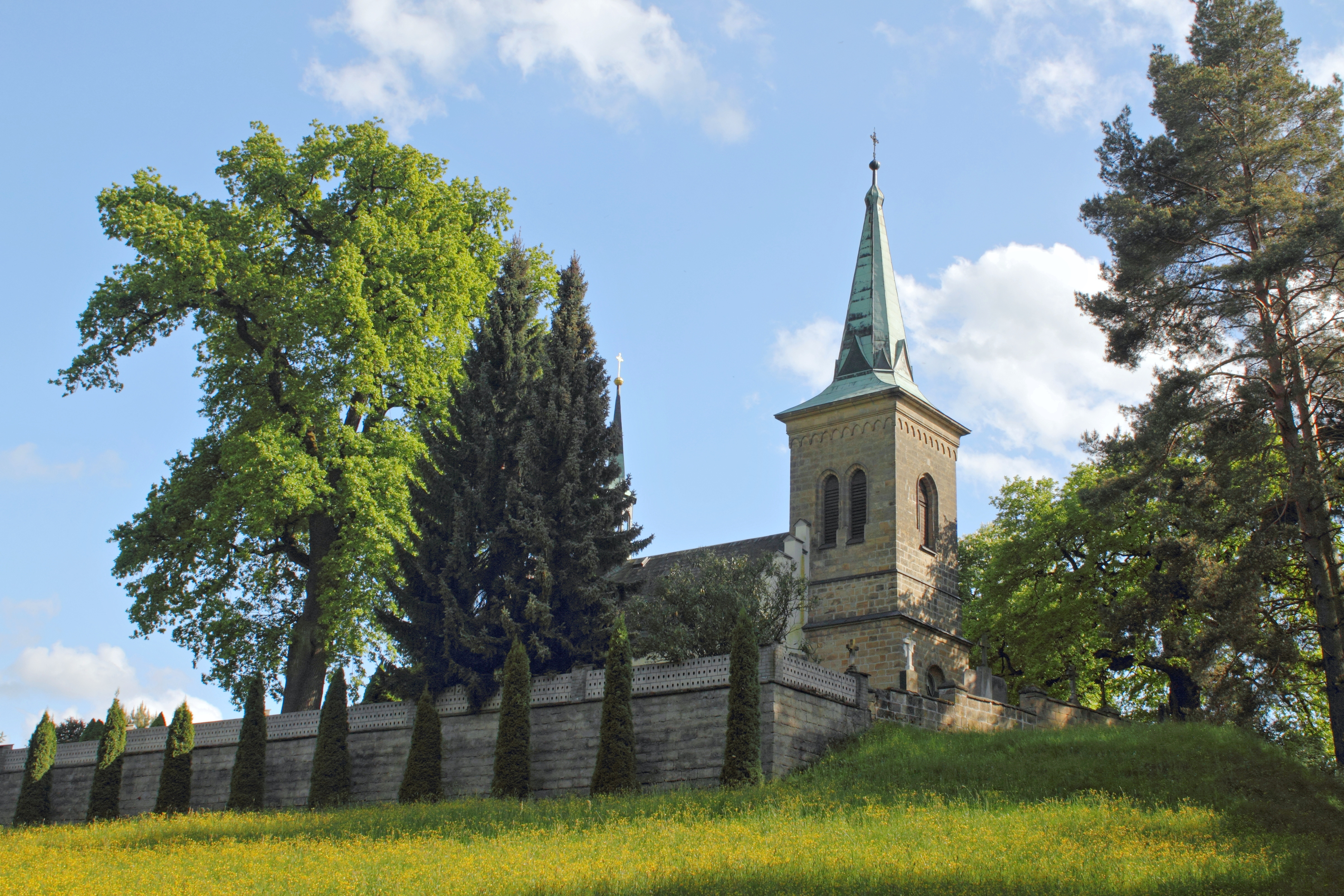 Kostel sv. Jiří (Karlovice), Přáslavice, Karlovice